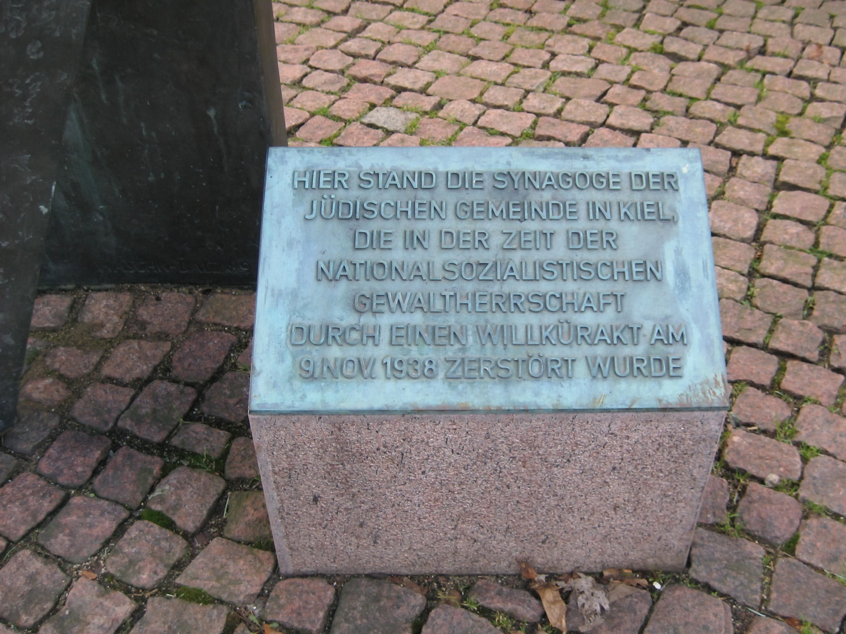 Gedenktafel zur Erinnerung an die Zerstörung der Kieler Synagoge Goethestraße während der Reichspogromnacht 1938. Die Gedenktafel wurde 1968 zunächst an einem Mehrfamilienwohnhaus angebracht, mit dem das frühere Synagogengrundstück in den 1960er-Jahren neu bebaut worden war. Später wurde die Gedenktafel in ein 1989 von der Bildhauerin Doris Waschk-Balz geschaffenes Mahnmal integriert und befindet sich seitdem auf einem niedrigen Natursteinsockel neben dem Mahnmal.Standort: Auf dem früheren Synagogengrundstück in der Goethestraße/Ecke Humboldtstraße in Kiel-Schreventeich in Schleswig-Holstein, Deutschland.